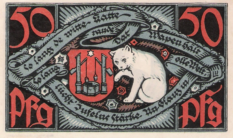 Notgeld Bad Salzuflen